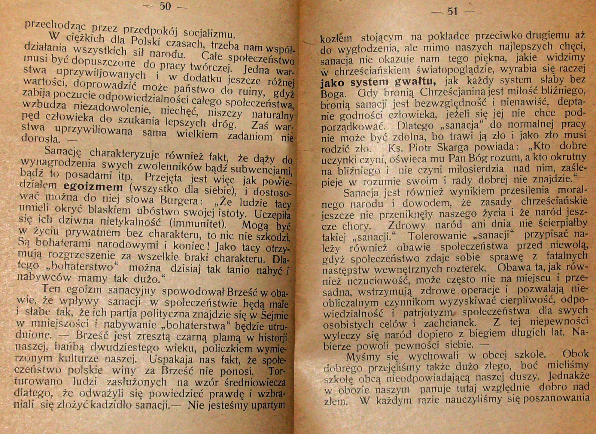 Stanisław Krzyżowski, Rozmyślania w czterdziestą rocznicę encykliki „Rerum novarum”, wydanej 15 maja 1891 r. przez papieża Leona XIII, Pszczyna 1931